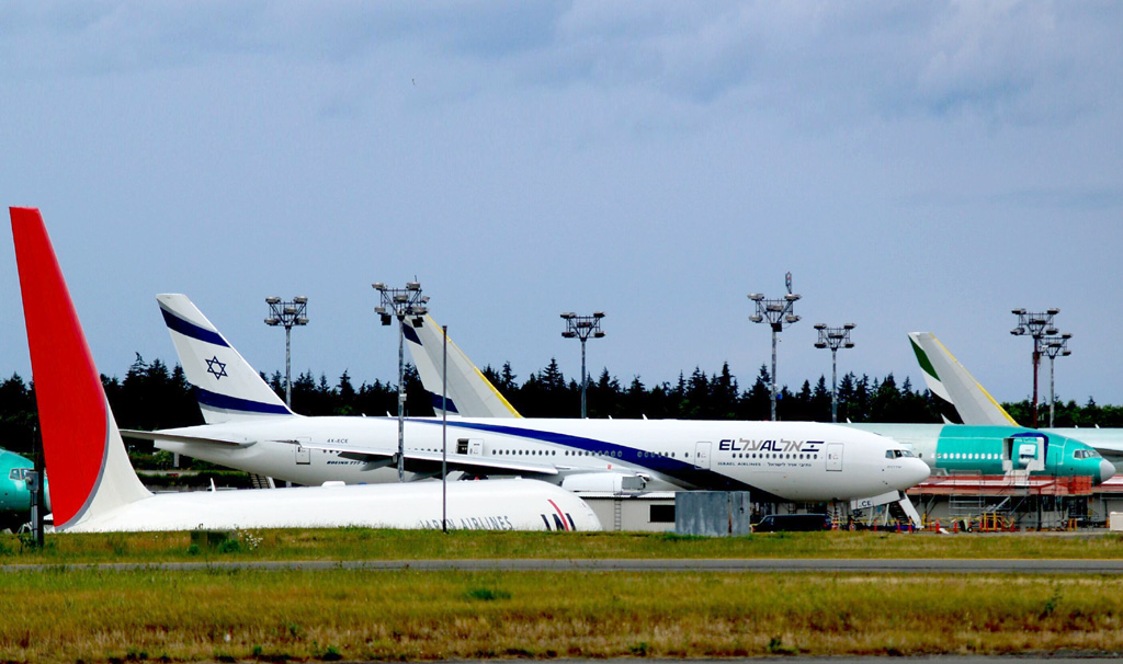 Boeing 777s at Everett Field